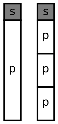 s — часть программы, которая может быть выполнена только одним потоком p — часть программы, которая может выполняться параллельно